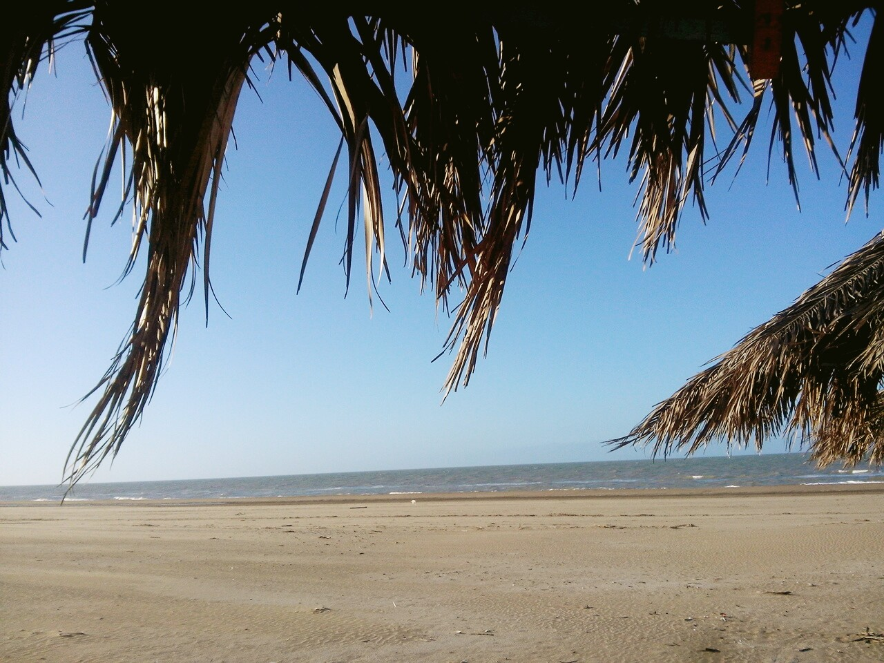 Playa de San Clemente del Tuyu